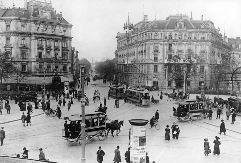 Berlin, Potsdamer Platz Berlin 1914. Blick auf den Potsdamer Platz und in die Königgrätzerstr. in Richtung Brandenburger Tor. Links im "Tiergarten-Hotel" befindet sich das Cafe Josti. Information added by Wikimedia users.Korrektur: Das Foto zeigt links das Gebäude Potsdamer Platz 1 mit dem Doppelhotel Grand Hotel Bellevue/Thiergarten-Hotel (Hotel du Parc), gelegen zwischen Königgrätzer Straße (heute: Ebertstraße) und Bellevuestraße. Das Café Josty (nicht Josti!) lag jedoch auf der außerhalb des linken Bildrands gelegenen anderen Straßenseite, am Dreieck zwischen Bellevuestraße und (Alter) Potsdamer Straße. Seine offizielle Adresse lautete Bellevuestraße 21-22.